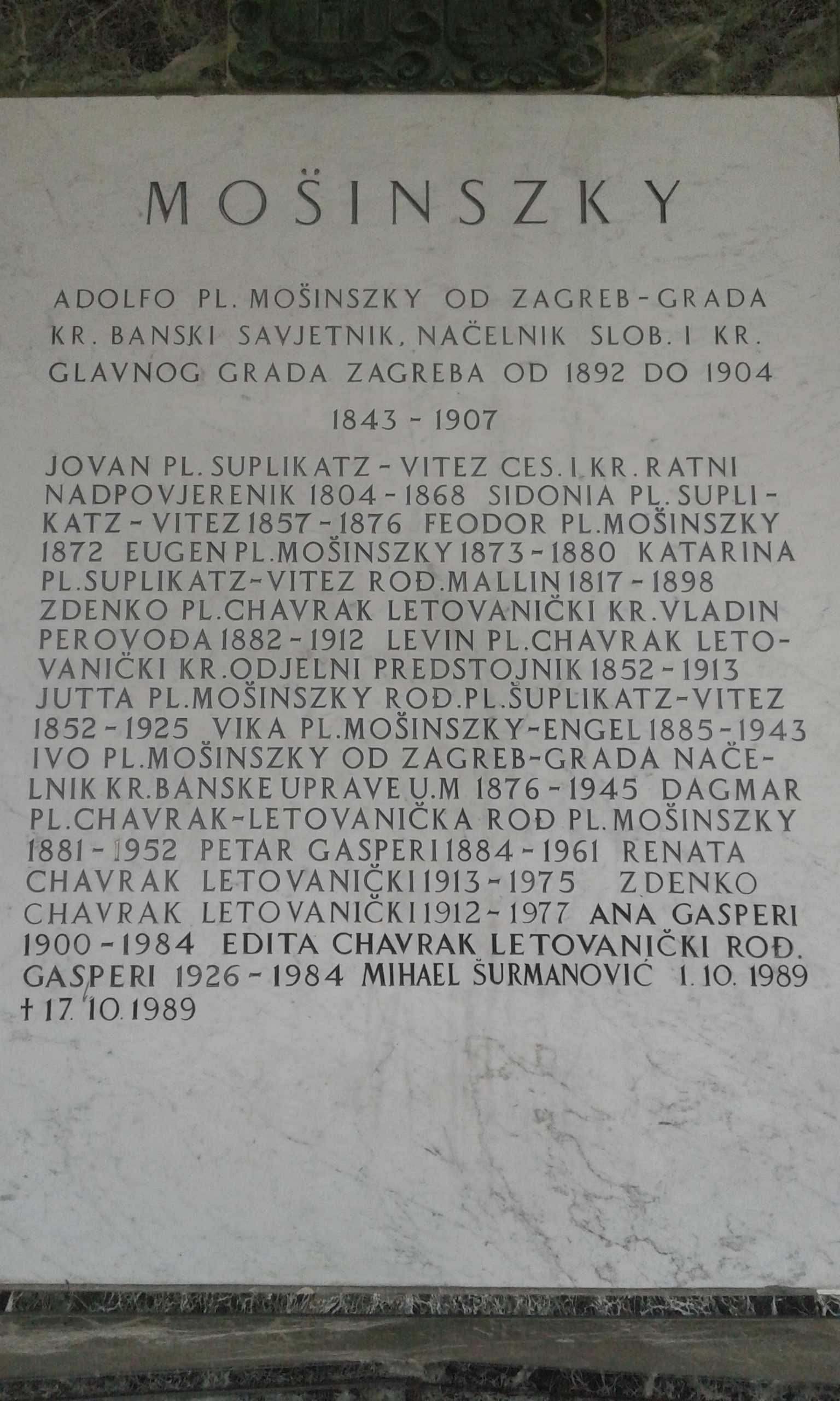 Nadgrobni spomenik Levina pl. Chavraka